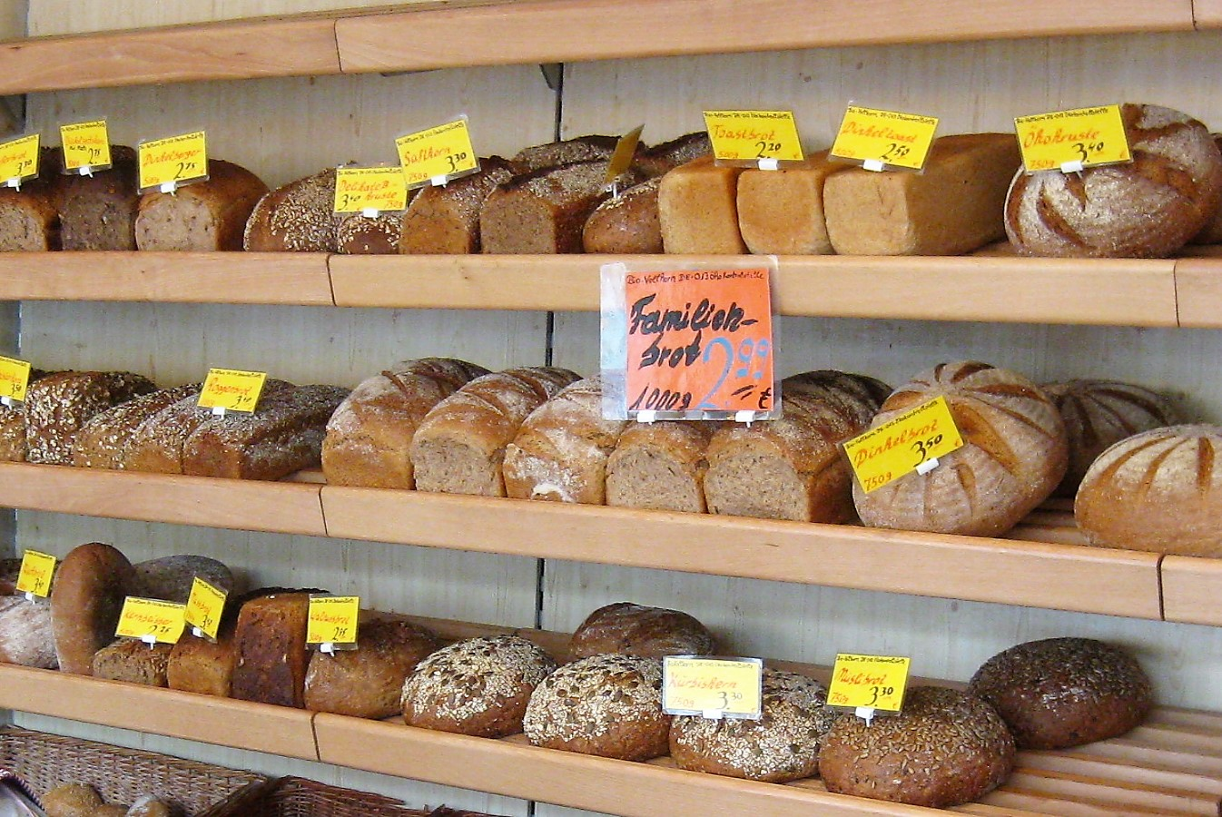 Angebot an verschiedenen Brotsorten in einem Brotverkaufsladen einer Bäckerei in Deutschland